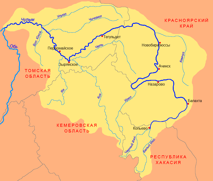 Схема бассейна реки Чулым (приток Оби)